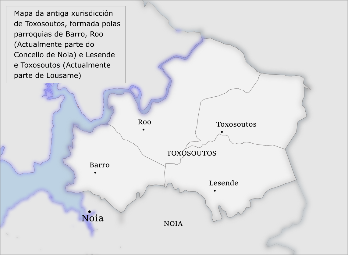 Jurisdicción de Toxosoutos (Galicia) a finales del Siglo XVIII. Estaba formada por las siguientes parroquias: -Toxosoutos (Actualmente parte del municipio de Lousame) -Lesende (Actualmente parte del municipio de Lousame) -Barro (Actualmente parte del municipio de Noia) -Roo (Actualmente parte del municipio de Noia)